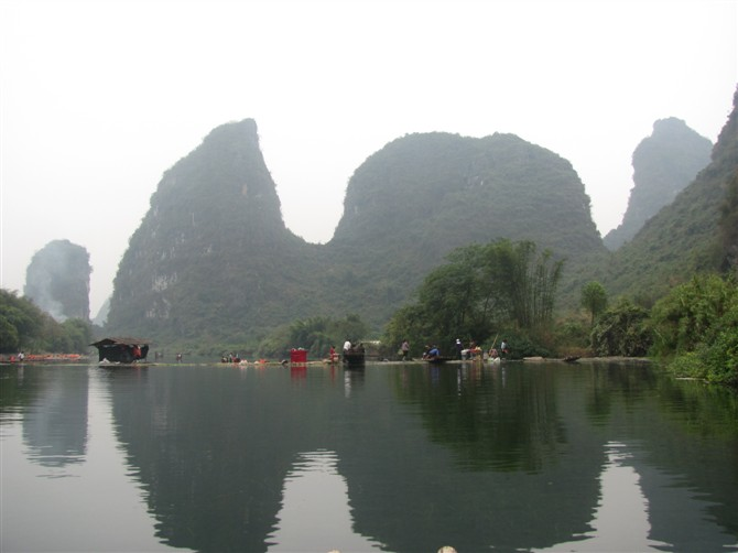 中文（中国大陆）: 广西桂林山水